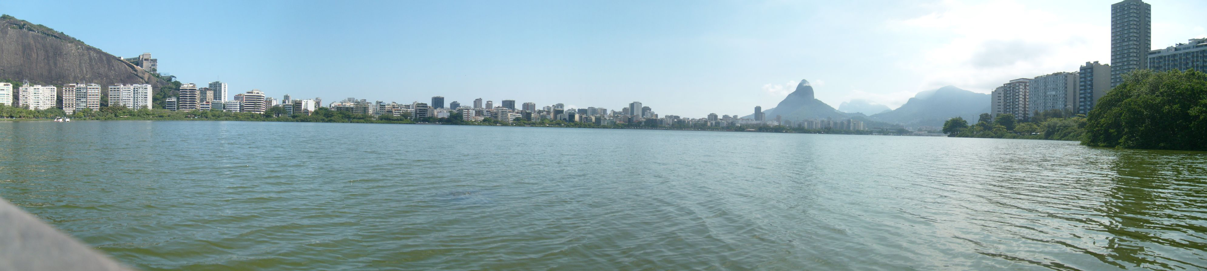 Foto panorâmica da Lagoa Rodrigo de Freitas, no Rio de Janeiro.